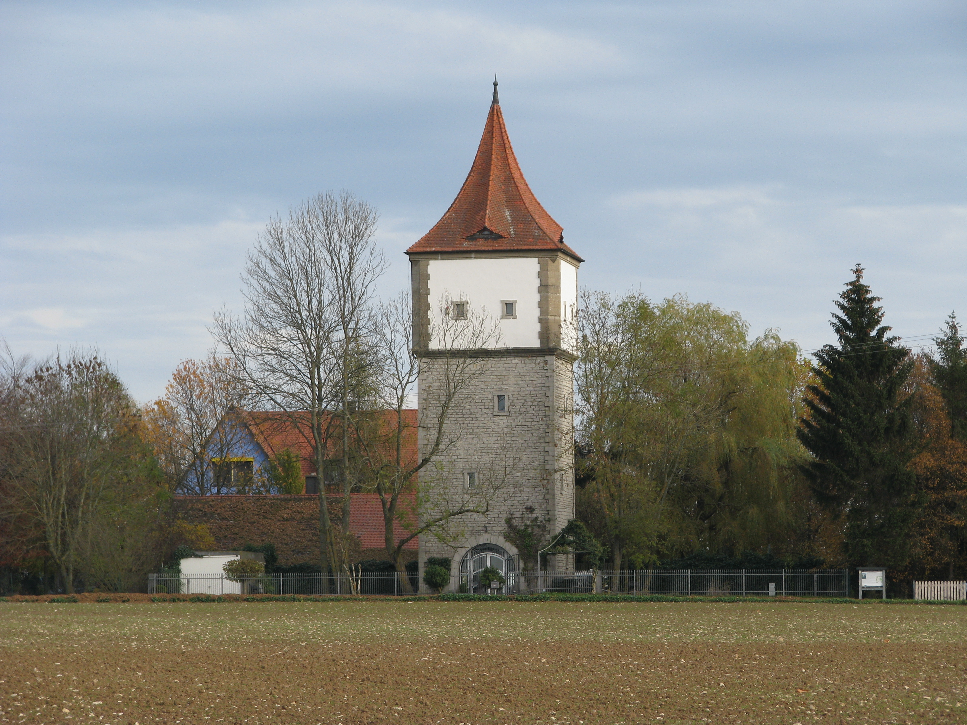 Viehhausen, Ortsteil von Greding im Landkreis Roth in Bayern, ehemaliger Wasserturm von 1911